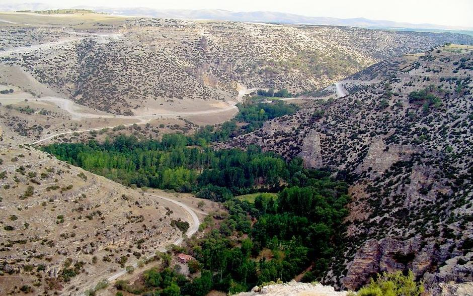 Ulubey Canyon in Uşak, Turkey